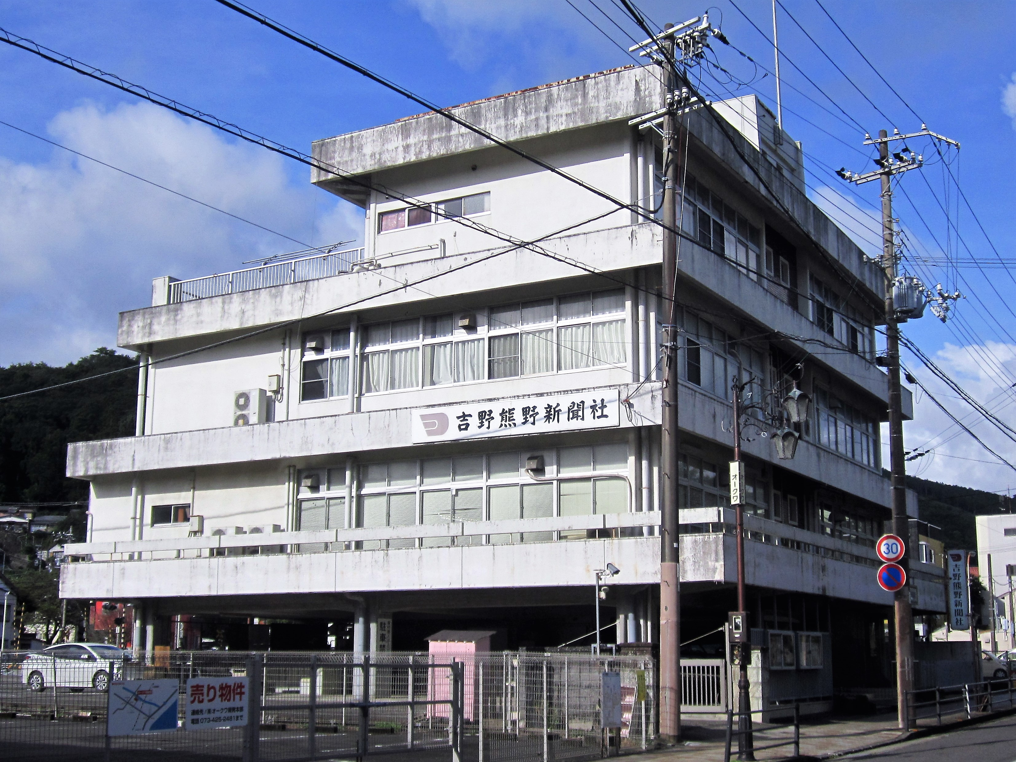 吉野熊野新聞